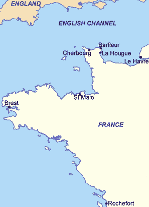 Barfleur